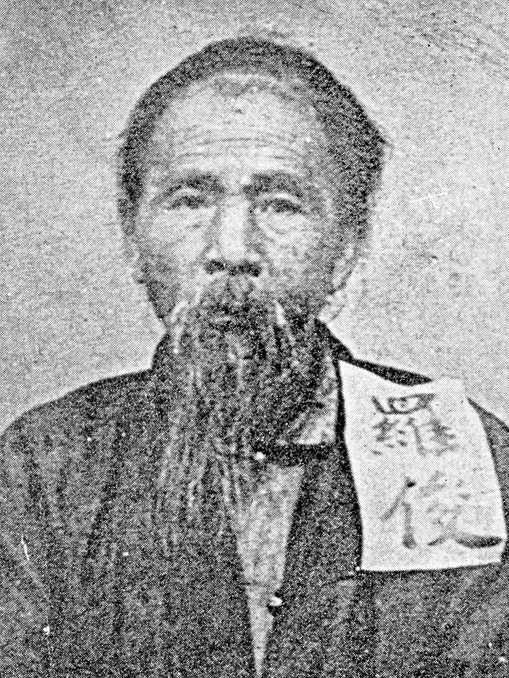 中文（台灣）: 西來庵事件 羅俊